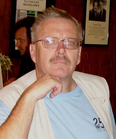 Marcin Wolski - polski artysta kabaretowy